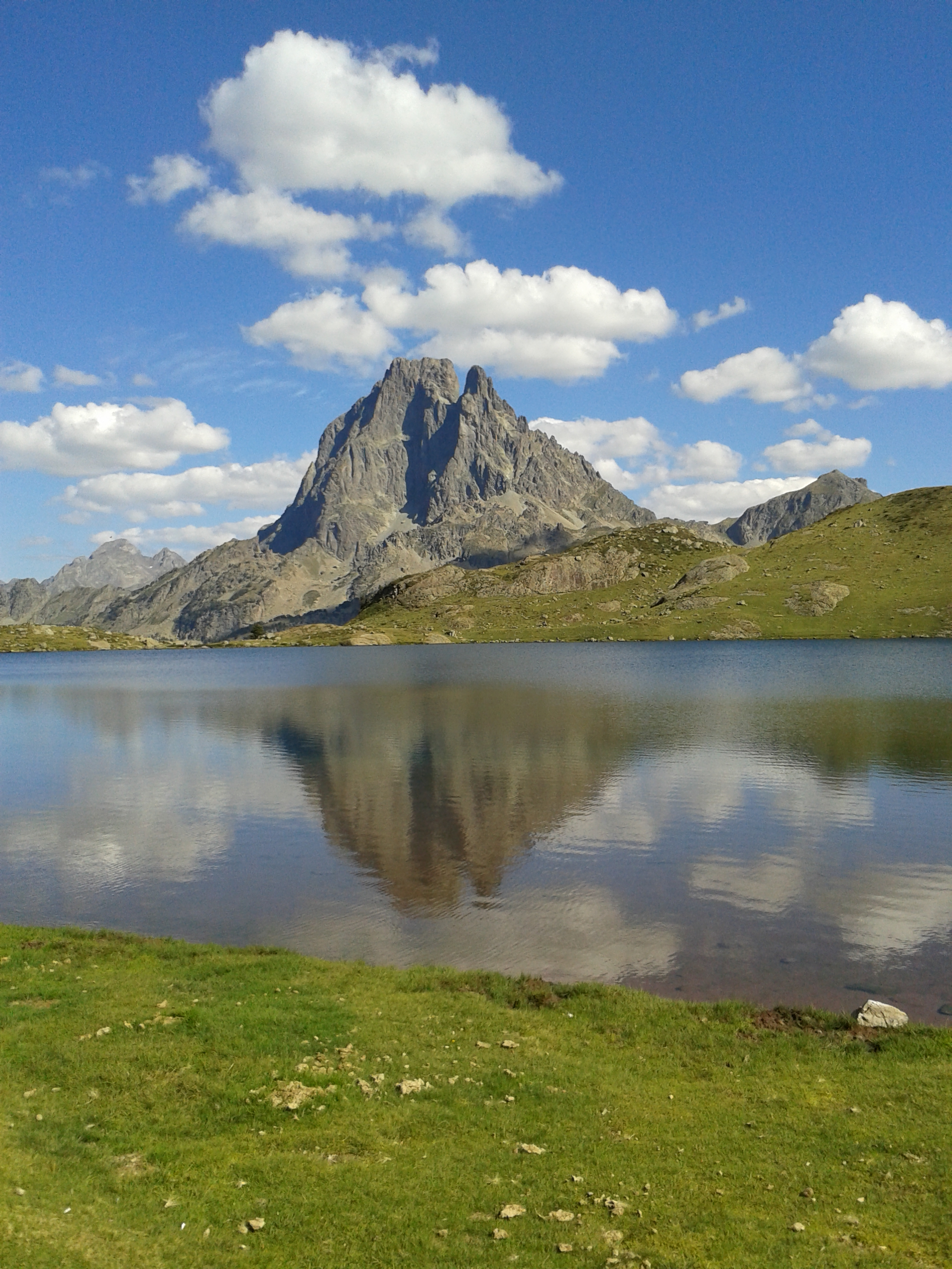 Midi d'Ossau Ayous lakuetatik